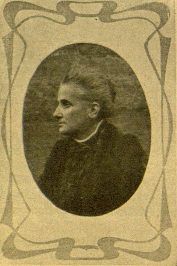 Portraitfoto der deutschen Schriftstellerin Babette von Bülow.